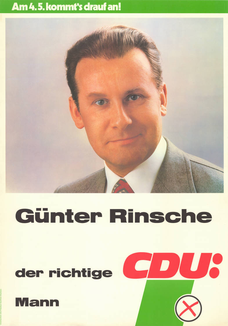 Am 4.5. kommt's drauf an! Günter Rinsche der richtige CDU: Mann Abbildung: Porträtfoto - Stimmkreuz Plakatart: Kandidaten-/Personenplakat mit Porträt Auftraggeber: Verantw.: CDU-Präsidium Nordrhein-Westfalen Objekt-Signatur: 10-009 : 721 Bestand: Landtagswahlplakate Nordrhein-Westfalen (10-009) GliederungBestand10-18: Landtagswahlplakate Nordrhein-Westfalen (10-009) » CDU Lizenz: KAS/ACDP 10-009 : 721 CC-BY-SA 3.0 DE